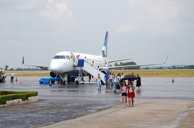 Aeronave EMB 175 da TRIP Linhas Aéreas em Ji-Paraná - RO